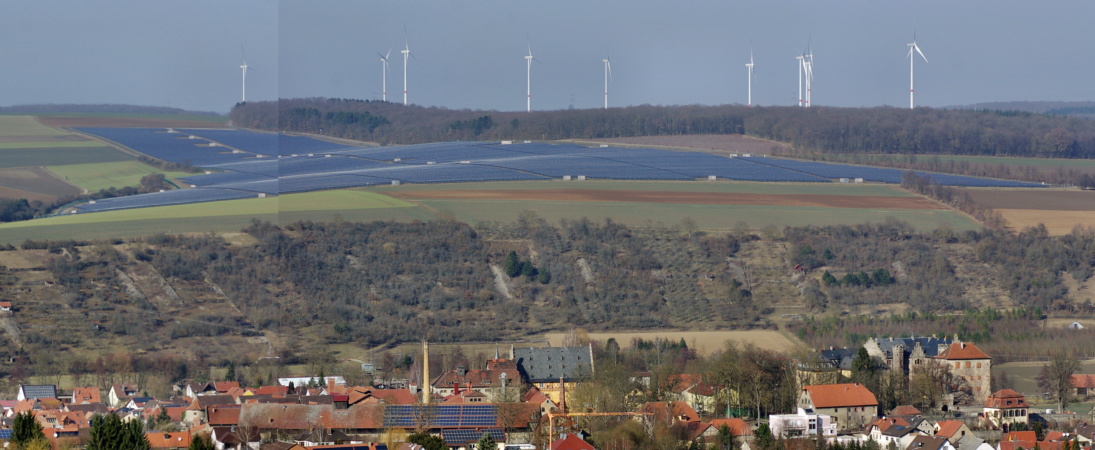 Photovoltaikanlage nördlich von Thüngen (auf einem ca. 40 ha großen Feld des "Hofguts")